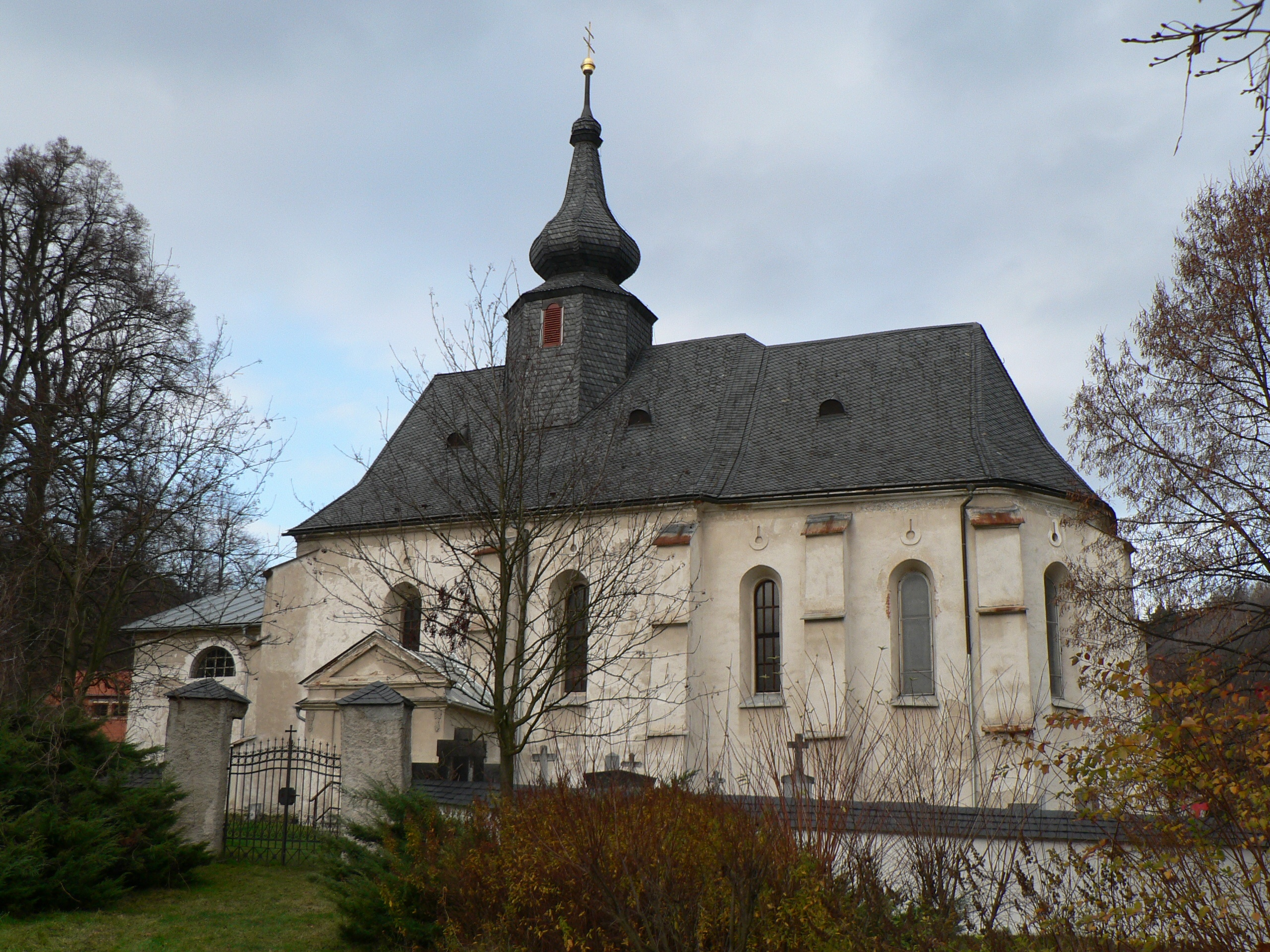 Kostel Všech svatých (Bratrušov)